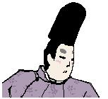 Kuva japanilaisesta hatusta, eboshista.